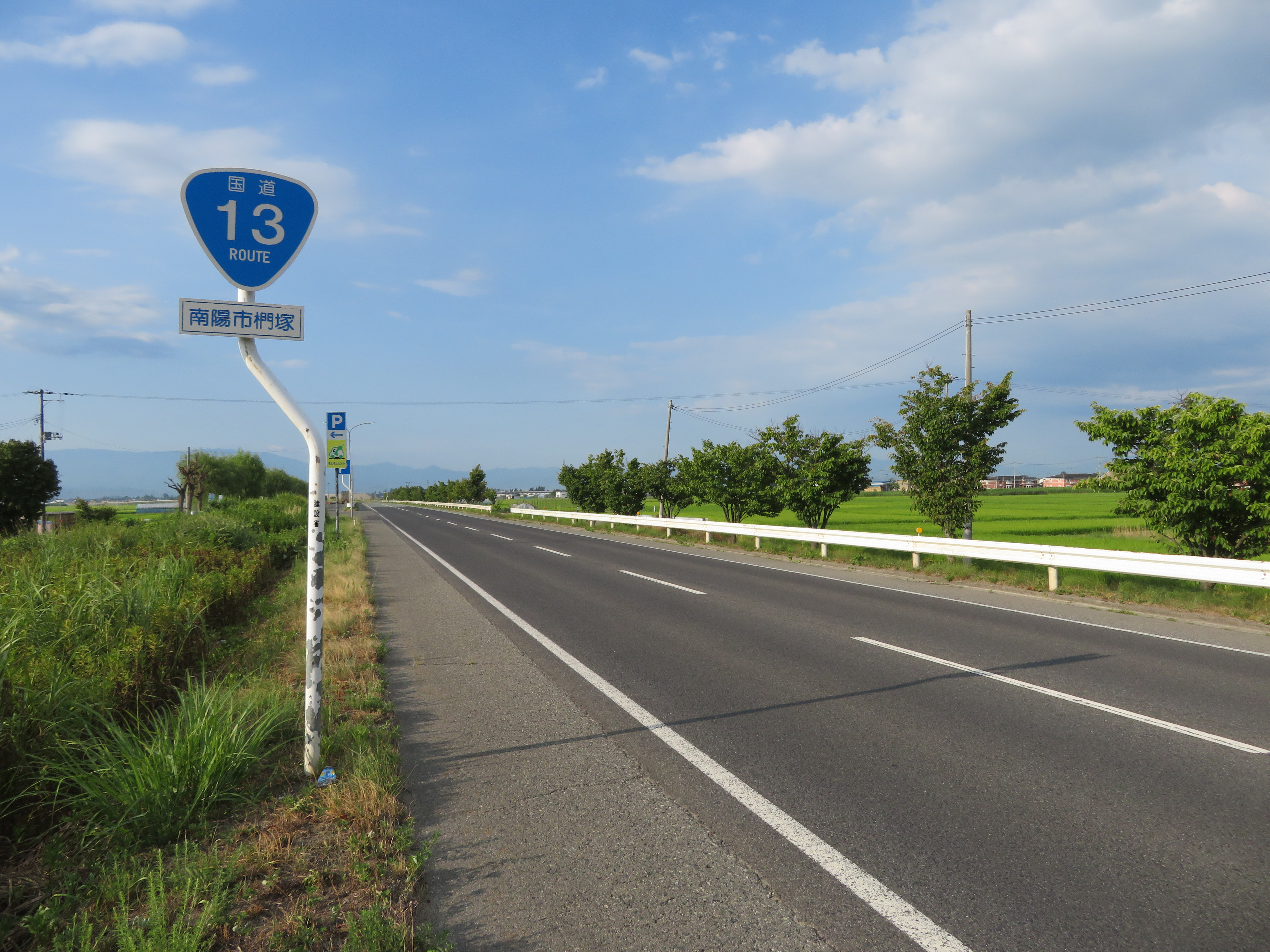 国道13号線南陽バイパス山形県南陽市椚塚付近（米沢方面を撮影） Canon PowerShot SX720 HS